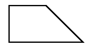 טרפז